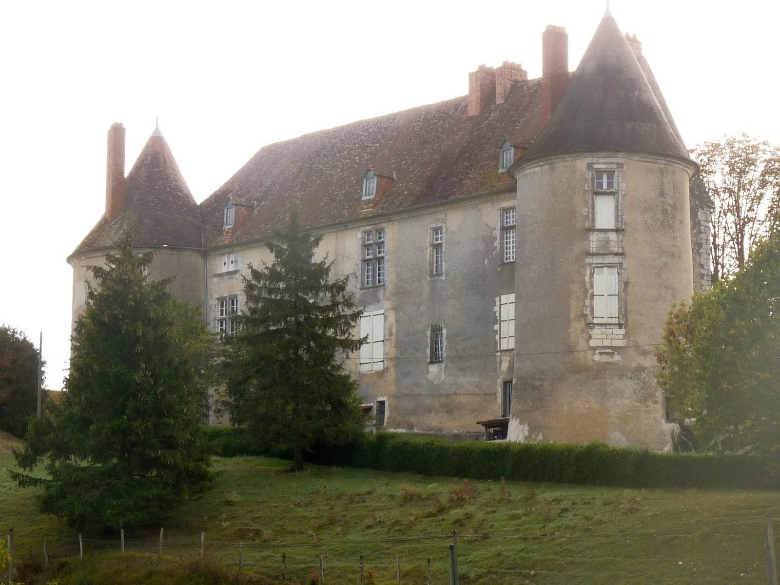 château de Sansac, Beaulieu-sur-Sonnette, Charente, France